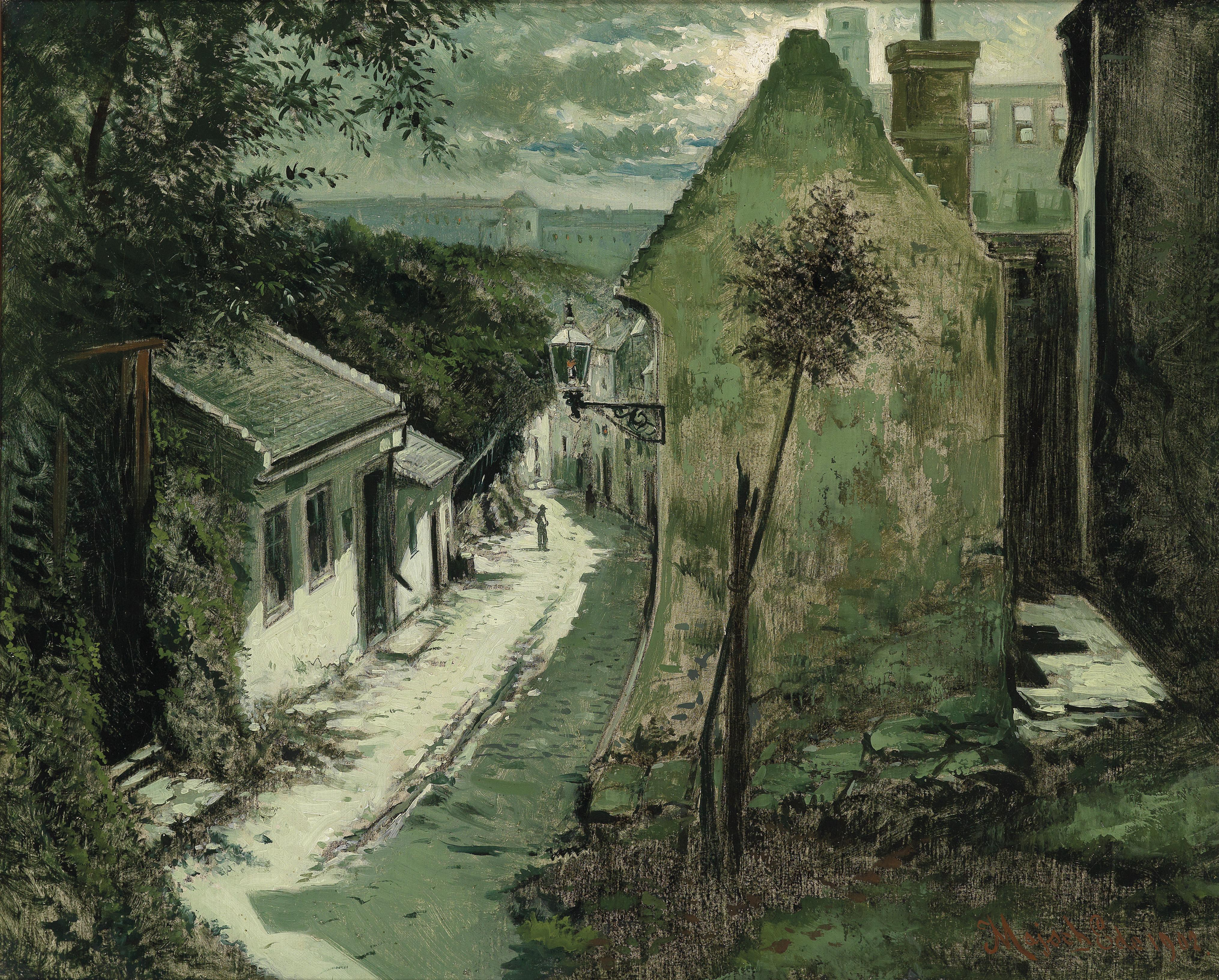 Motiv aus Bratislava